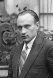 Paul Sacher in Basel am 2. Oktober 1930